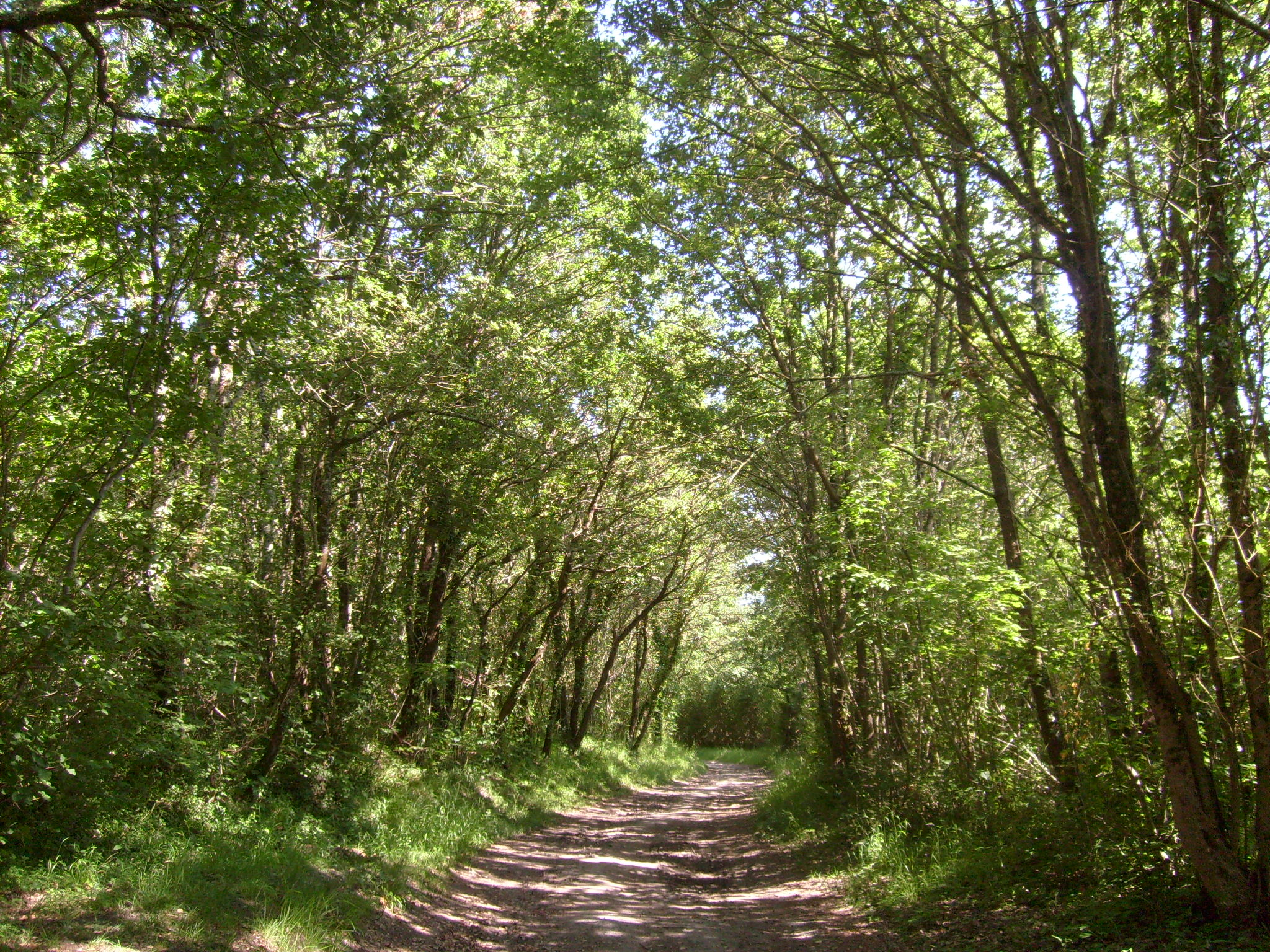 Bois de la Chèvre à Saint-Sulpice-de-Royan